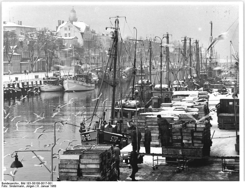 Warnemünde, Fischerboote Zentralbild Sindermann 8.1.1968 Rostook: Blick auf den Alten Strom. in Warnemünde mit den soeben vom Fang heimgekehrten Fischerbooten. Die Die Fischereiproduktionsgenossenschaft Warnemünde hat besonderen Anteil an der guten Planerfüllung 1967 der See- und Küstenfischer der DDR, die im vergangenen Jahr insgesamt 31700 Tonnen Fisch lieferten. Das sind 108 Prozent des Planes. (Zur Inf.: Hier ist die Hochseefischerei ausgeschlossen)